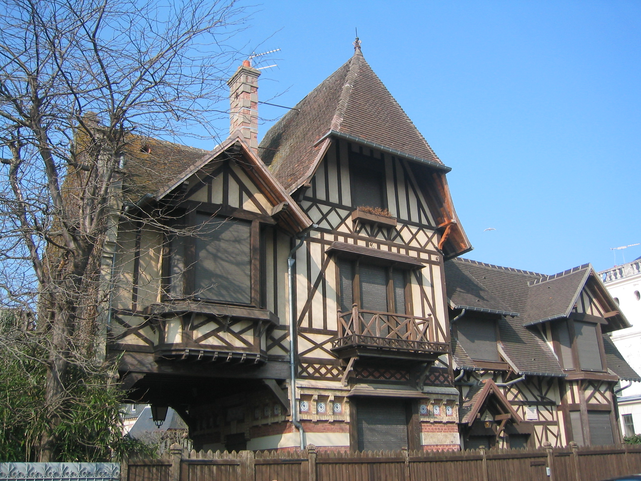 La villa Breloque, 8, rue Oliffe à Deauville (France), dans laquelle le peintre Eugène Boudin vécut la dernière année de sa vie et mourut le 8 août 1898